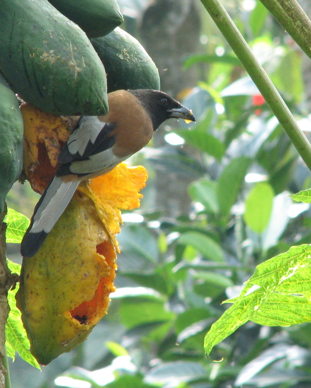 ഓലേഞ്ഞാലി. കോട്ടയത്തു നിന്നും പകർത്തിയ ചിത്രം.